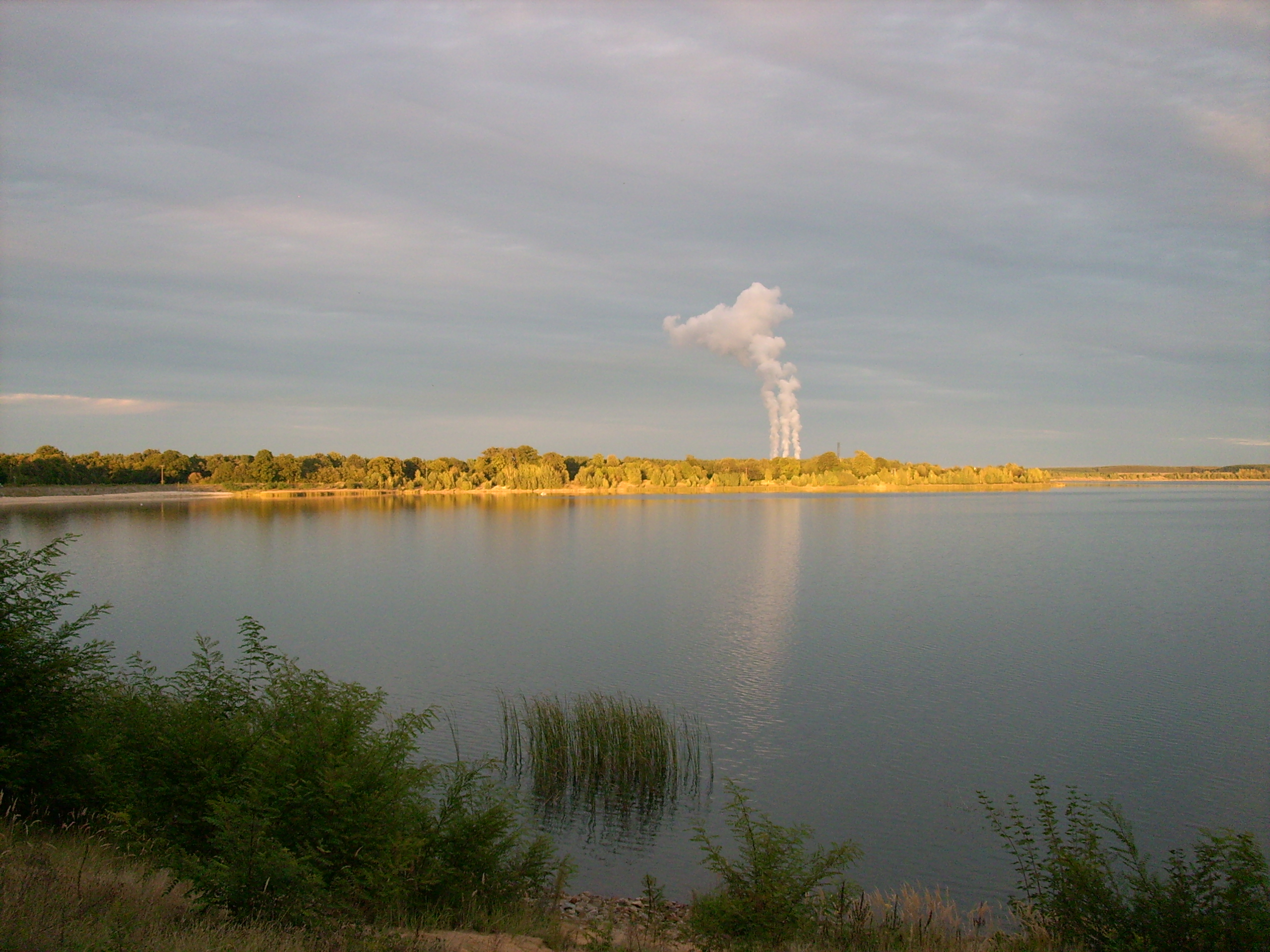 Dreiweiberner See bei Lohsa Hornjoserbsce: Při Třižonjanskim jězorje pola Łaza